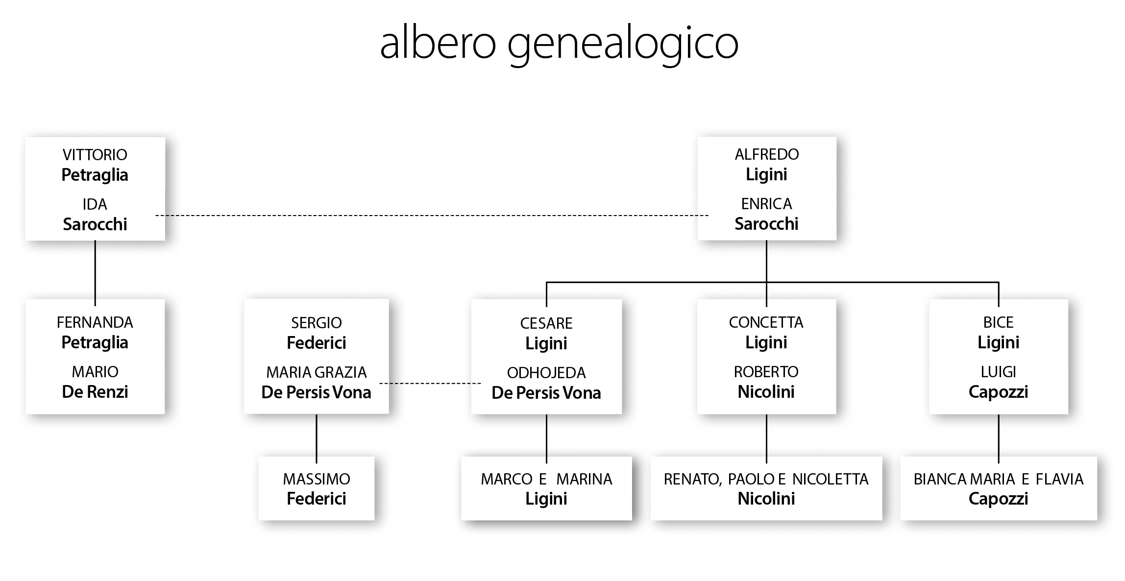 Albero genealogico della famiglia Ligini. Cesare è imparentato con Mario De Renzi, Roberto e Renato Nicolini.